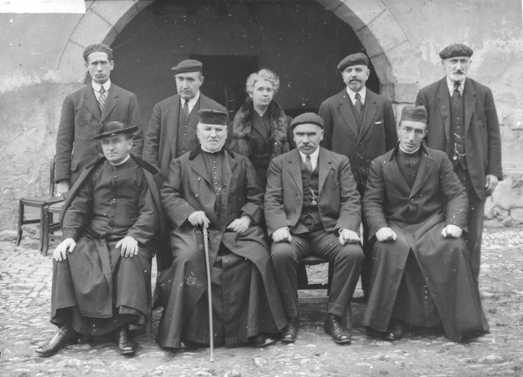 Ispasterko agintariak.